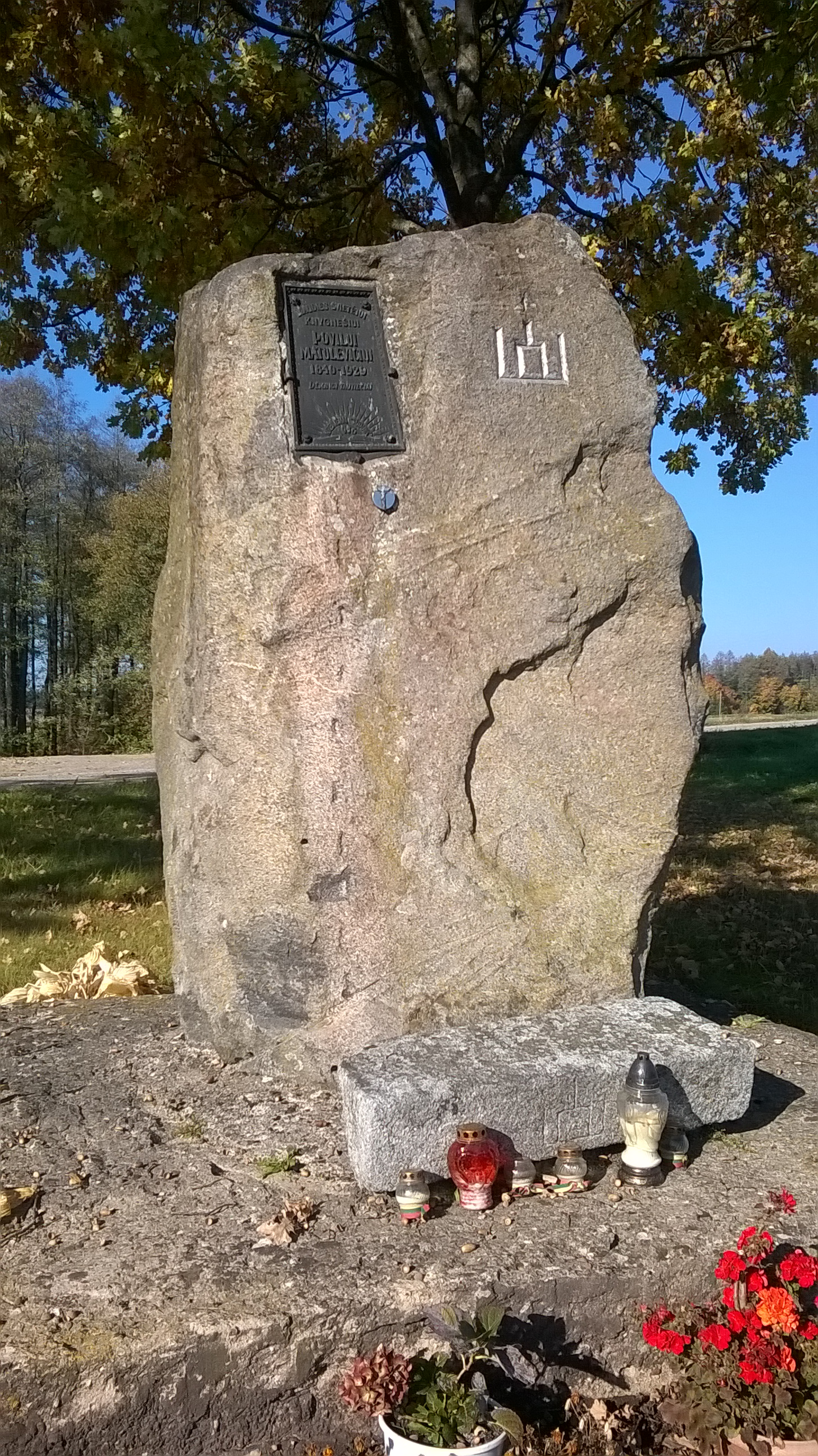 Pamiątkowy głaz poświęcony pamięci Pawła Matulewicza nosiciela książek.